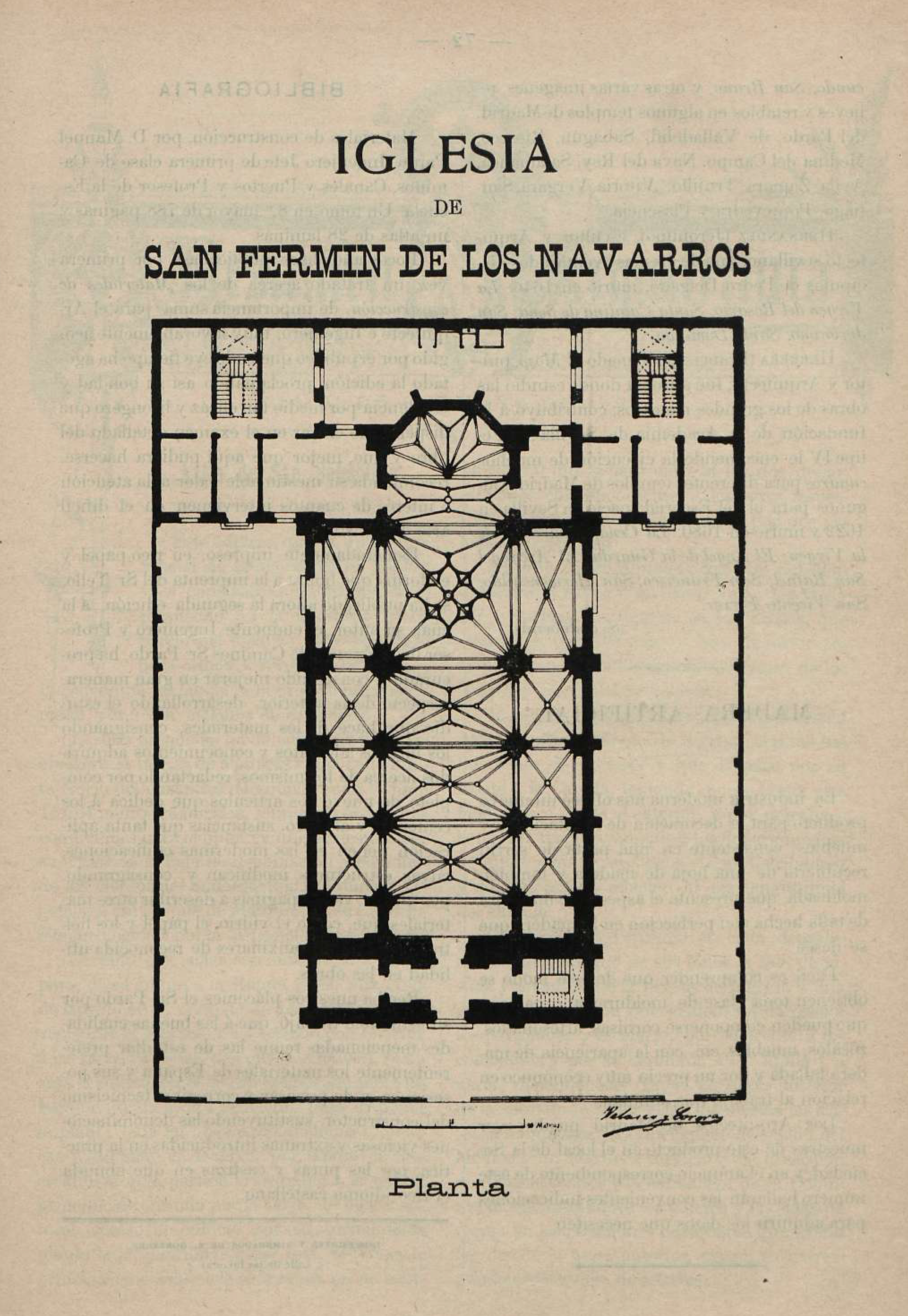 Iglesia de San Fermín de los Navarros, planta.